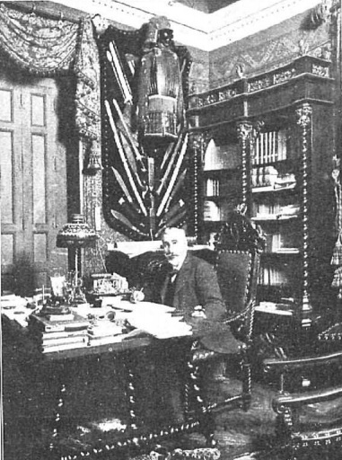 D. Antonio Maura en su despacho, fotografía de Franzen